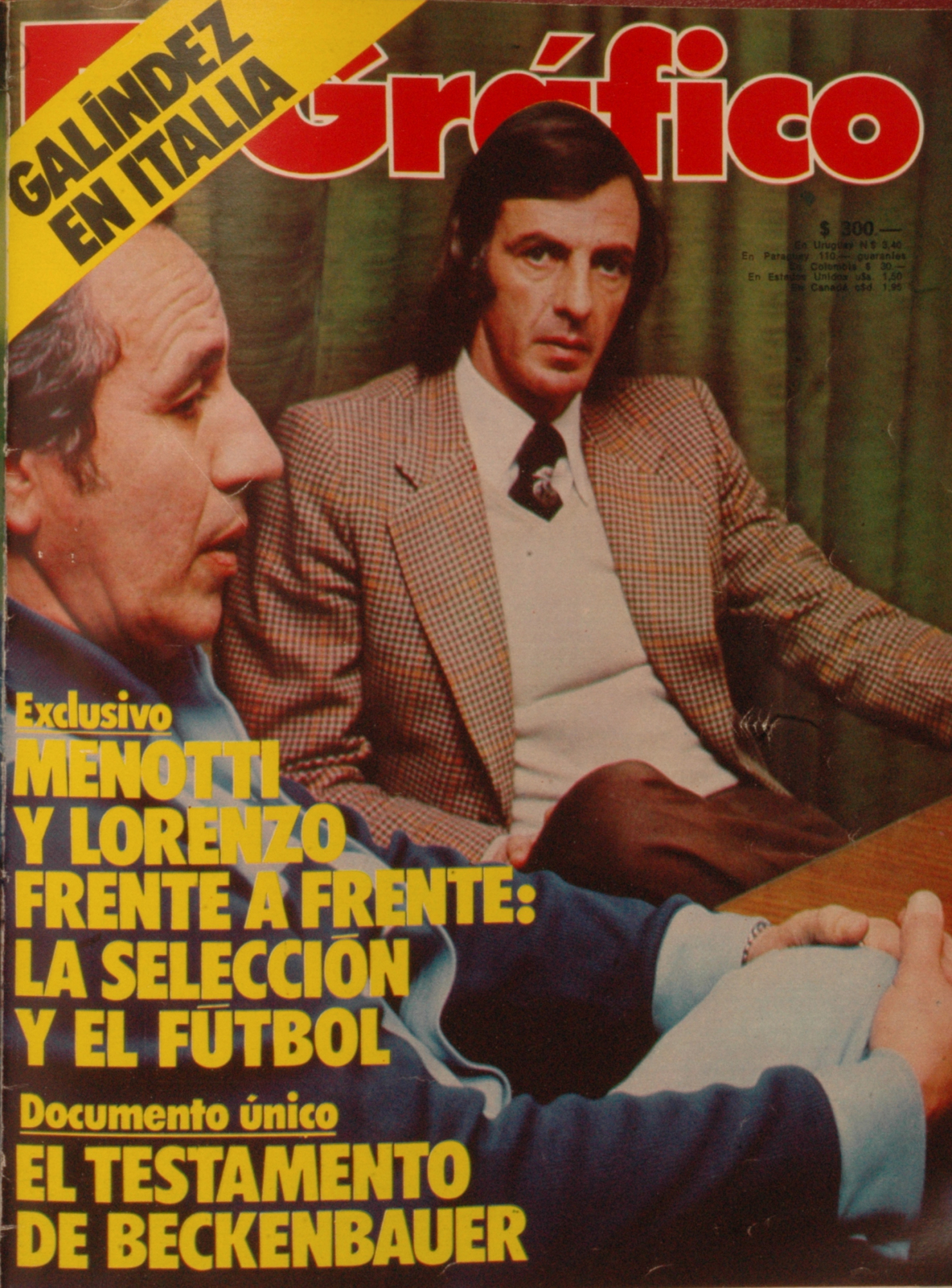 El Grafico del 14 de Junio de 1977. Edicion 3010